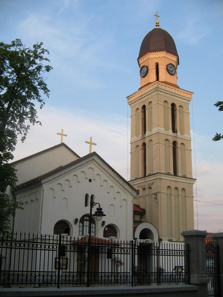 Orthodox cathedral in Zaječar, Serbia/La cathédrale orthodoxe de Zaječar, une des villes principales de Serbie